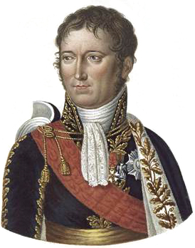 Subject : Adolphe Édouard Casimir Joseph Mortier (1768-1835), duc de Trévise, maréchal de France